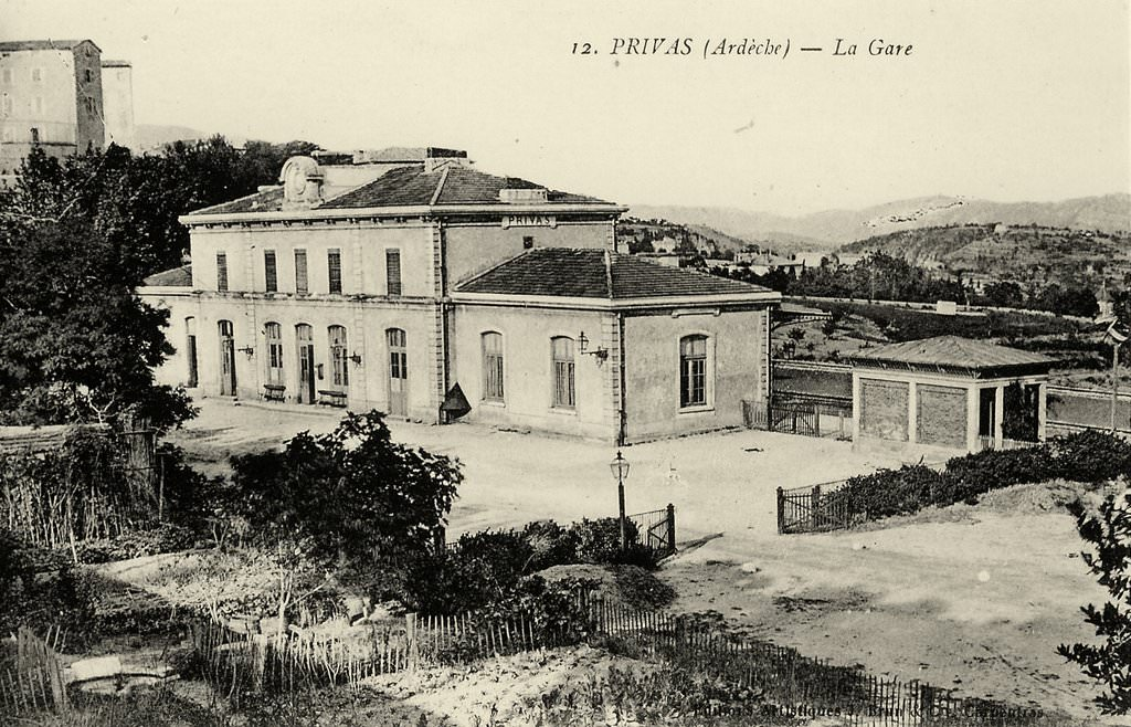 Gare de Privas.